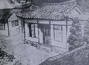 Joong Ang High School in 1918